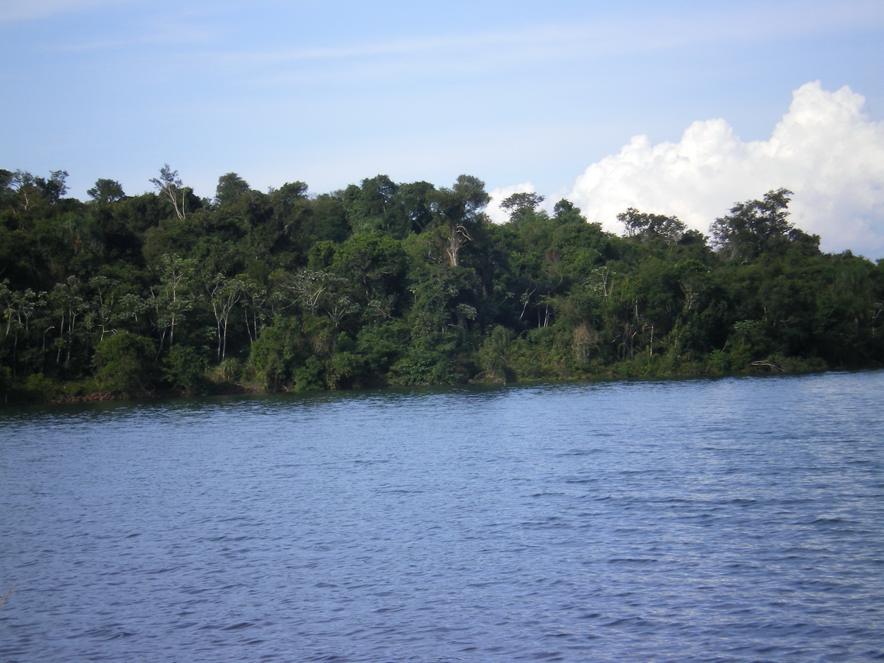 Fotos de los refugios y reservas de Itaipu, tomadas en los años 2007 y 2008 por mí Reserva de Itabo